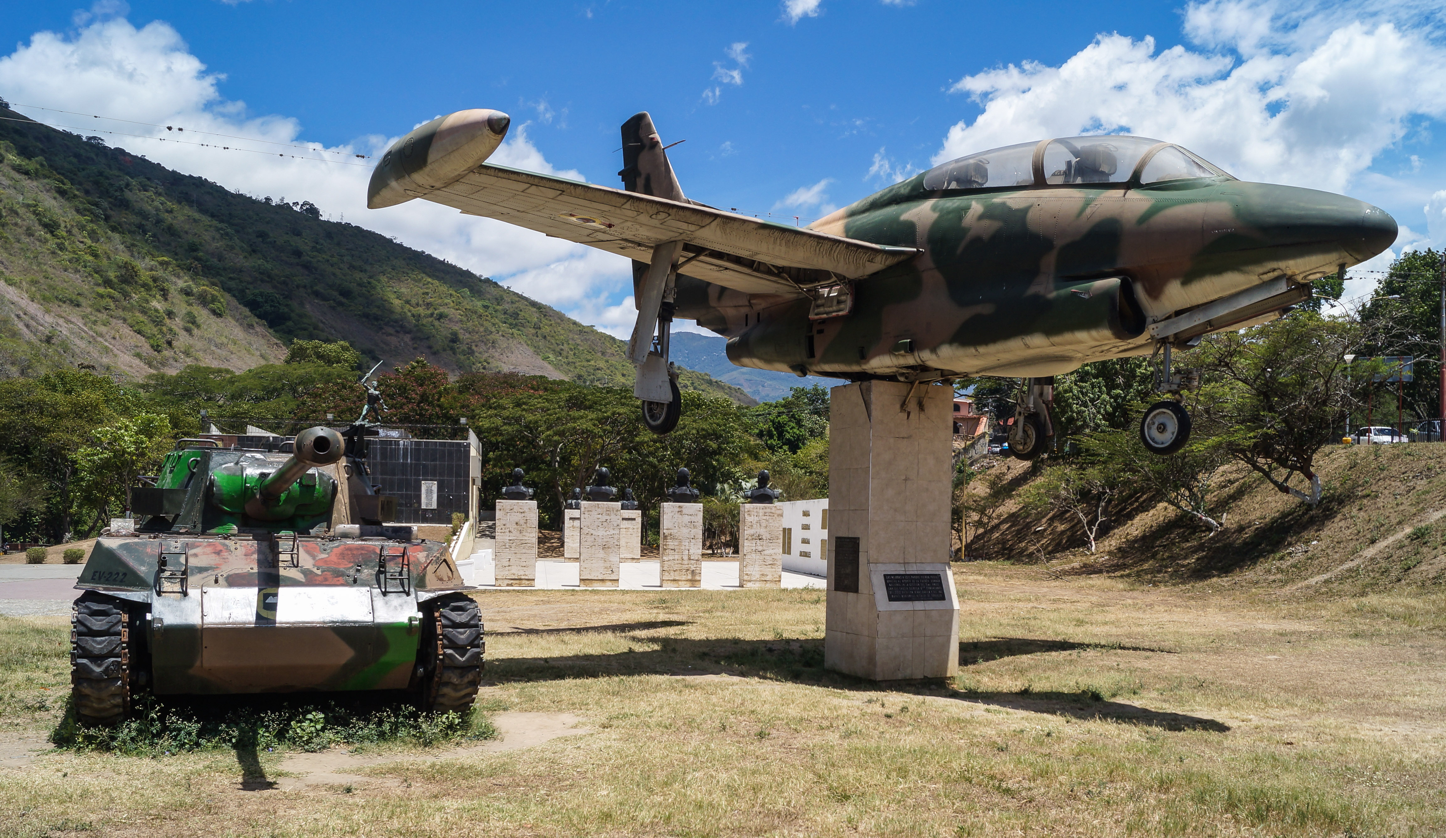 Monumentos en el Parque Fuerzas Armadas Nacionales. Trujillo. Venezuela.